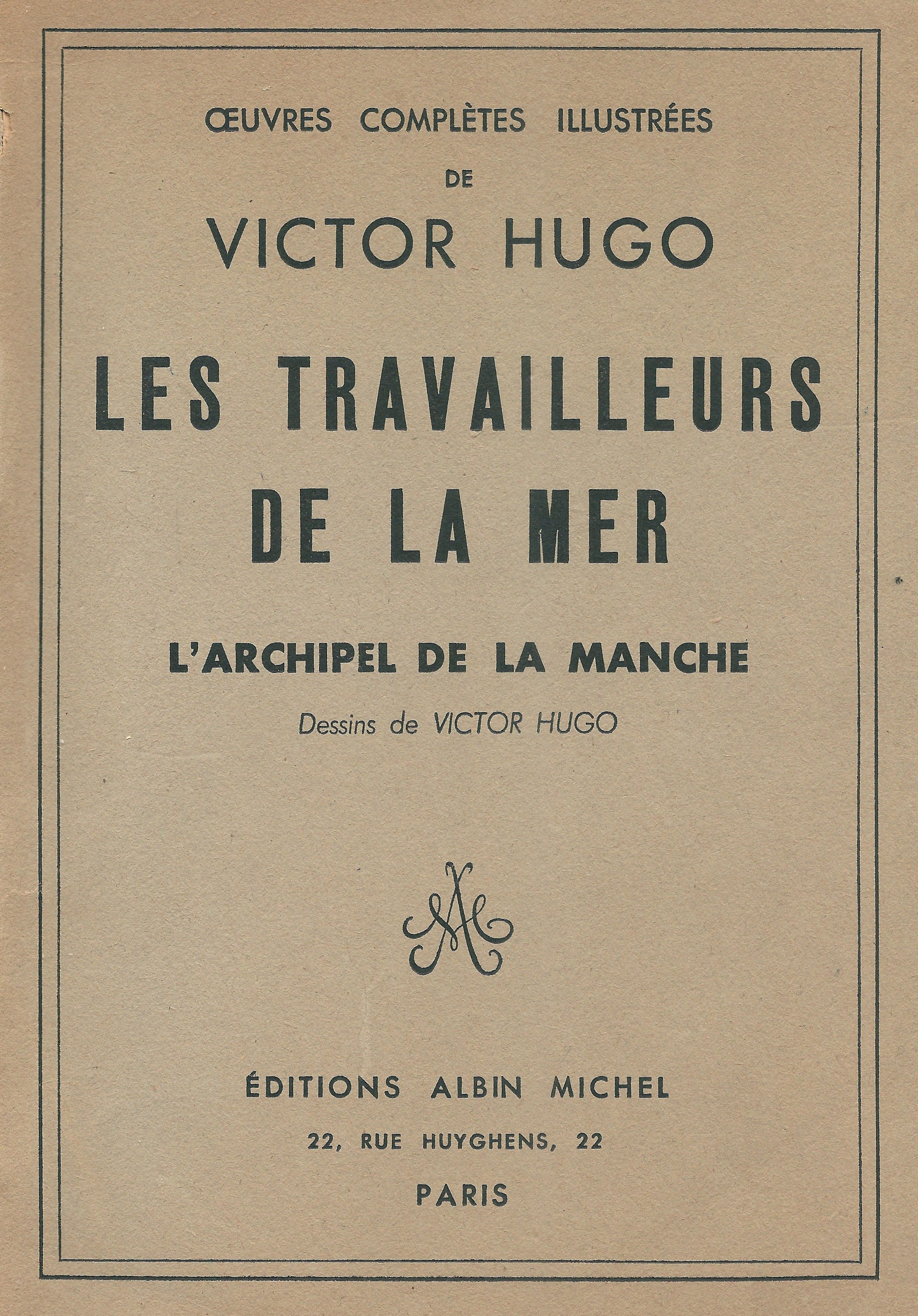 Couverture de Les Travailleurs de la Mer - L'archipel de la Manche, des éditions Albin Michel